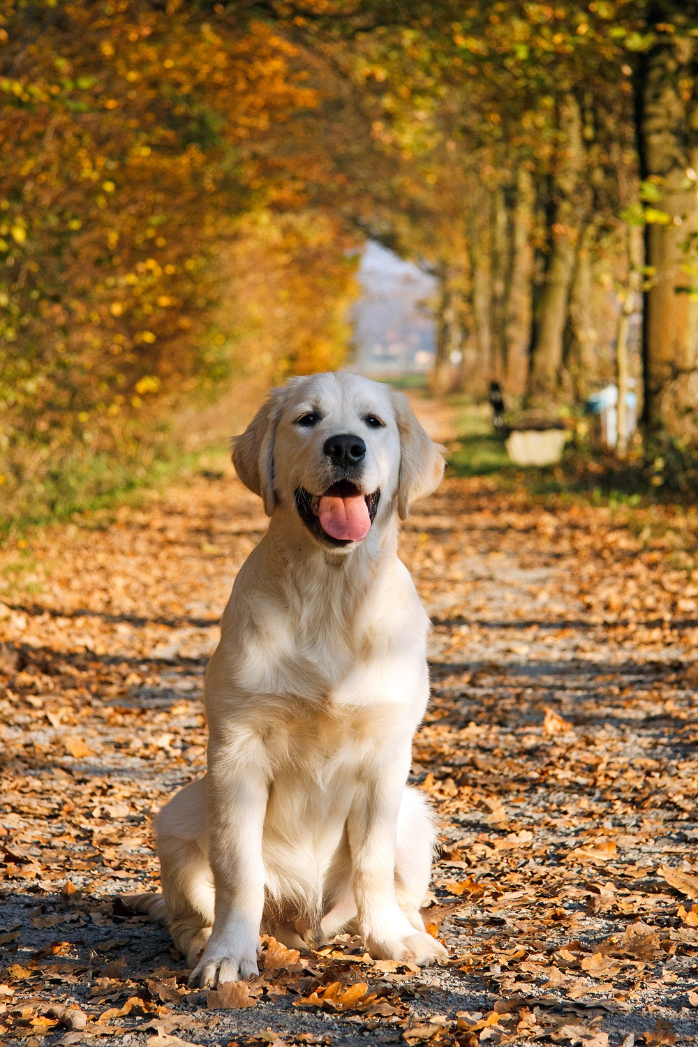 Golden Retriever Junghund (Rüde)